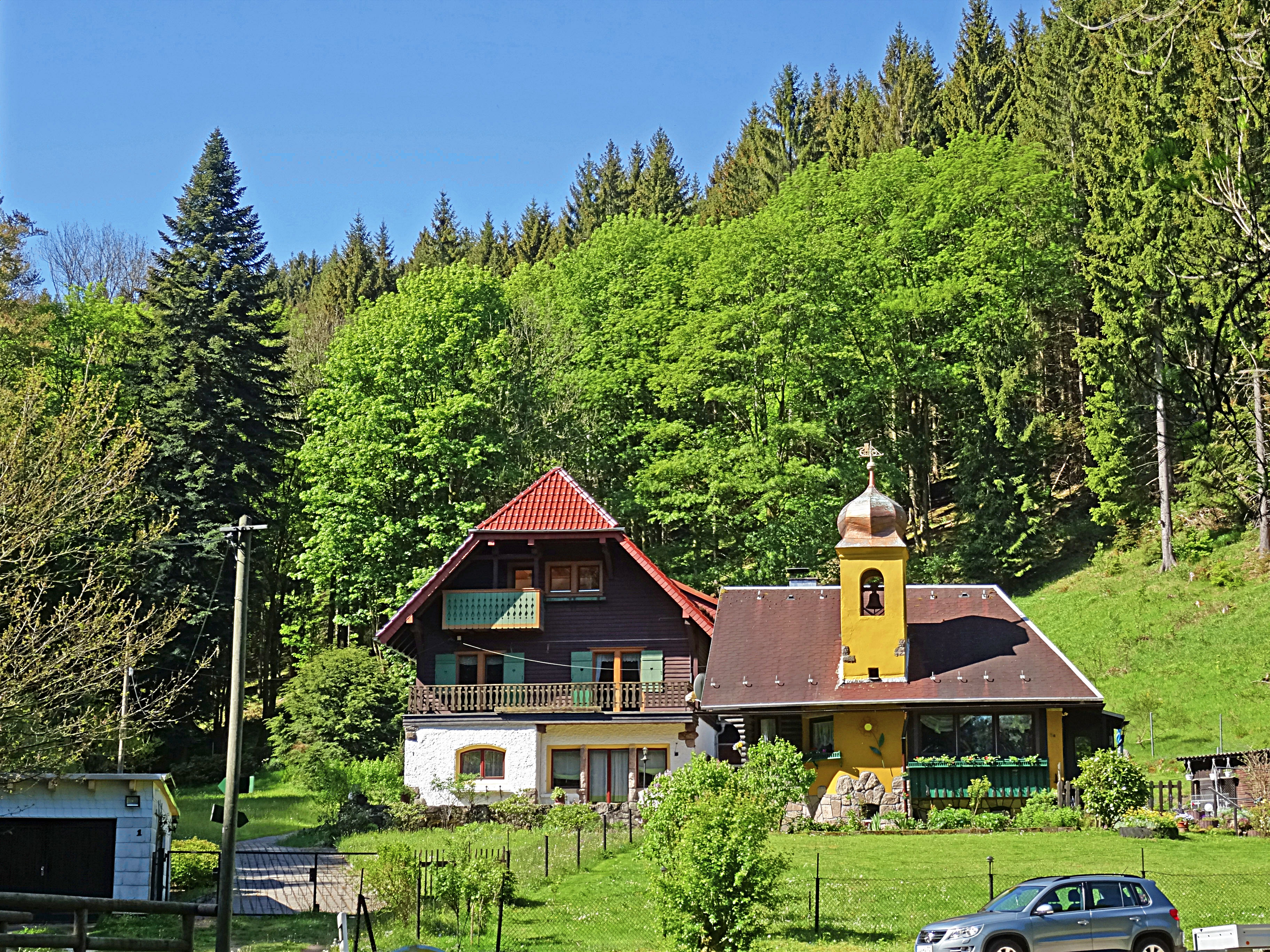 Hans Kehrs Sommerhaus "Glöckchen im Tal" im Edelmannsgrund bei Gehlberg von 1908. Er war ein international geachteter Professor und Begründer der deutschen Gallenwegschirurgie.